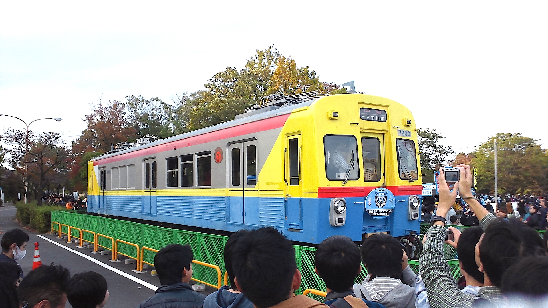 東急7200形架線検測車。廃車前日の2013年11月10日、Jリーグ川崎フロンターレ戦のプレイベントとして展示されたもの